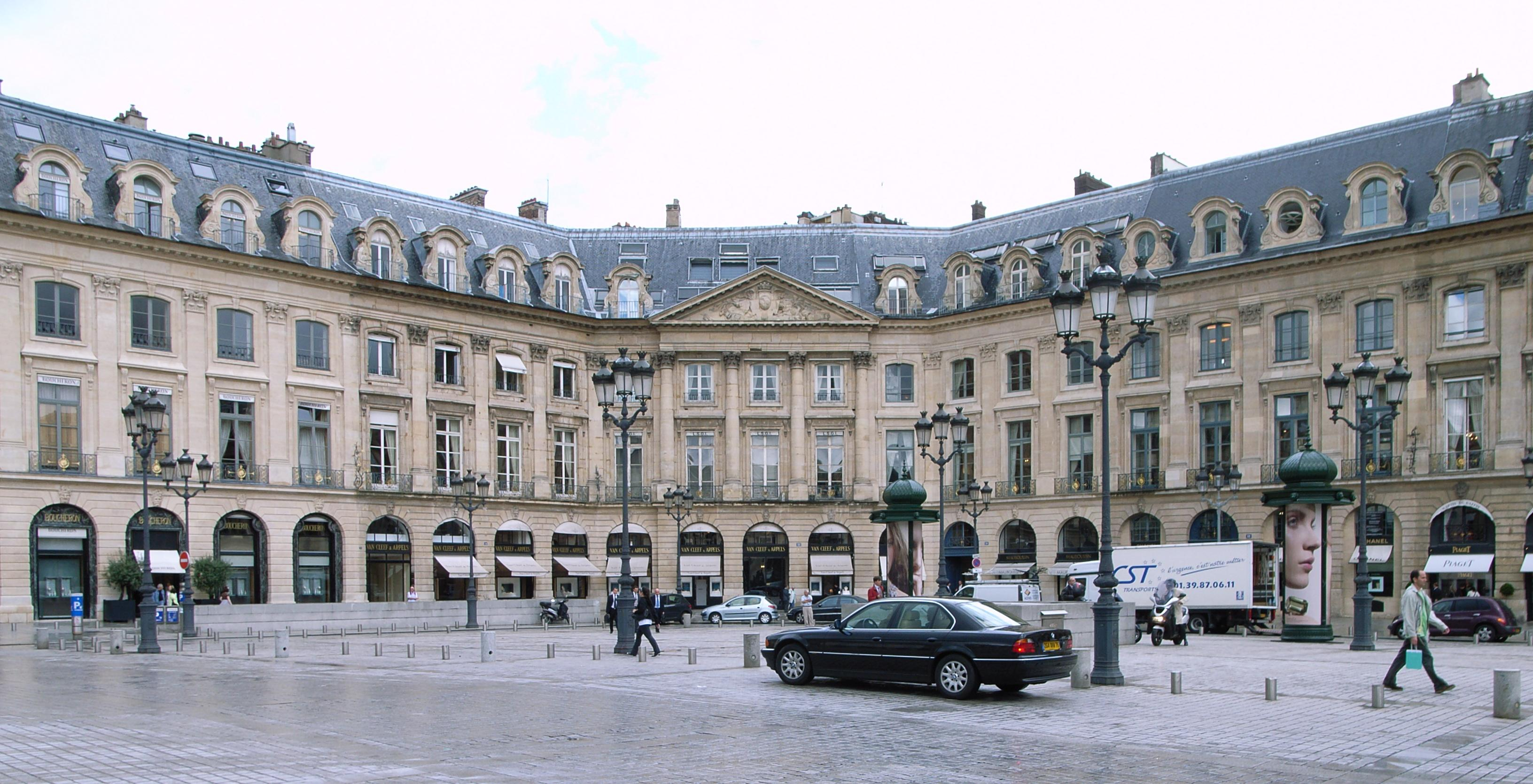 Place Vendôme, Paris